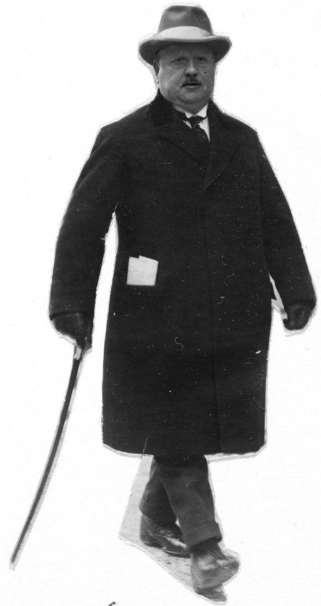 Ole Olsen Lian (født 10. november 1868 i Tønsberg, død 21. februar 1925 i Oslo) var en norsk politiker (Ap) og formann for LO fra 1906 til sin død.